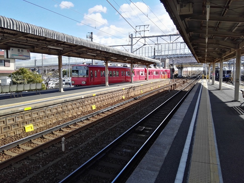 Toyoake station platform